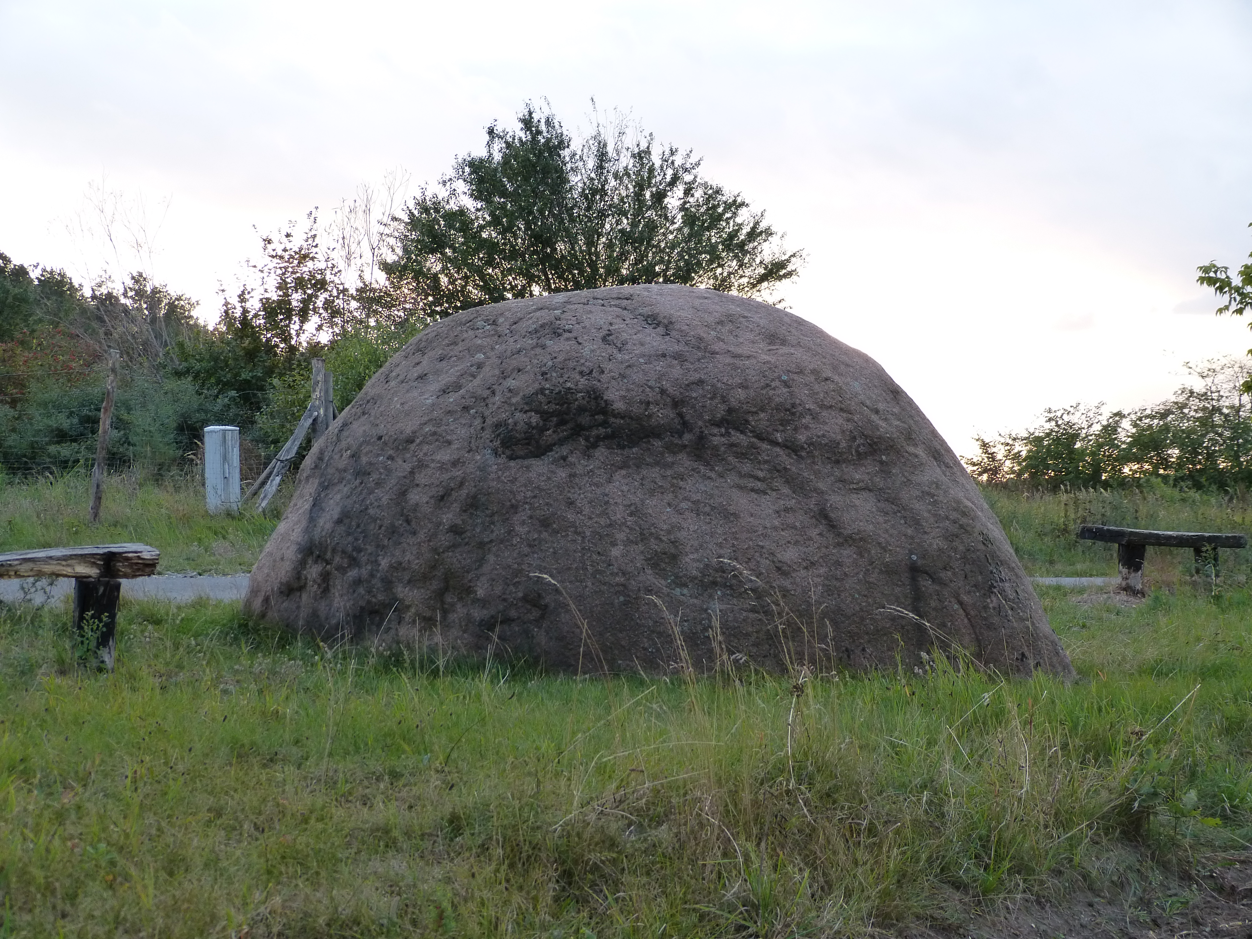 Nordöstliche Ansicht.